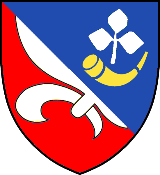 Vapensköld för finländska adelsätten von Rettig